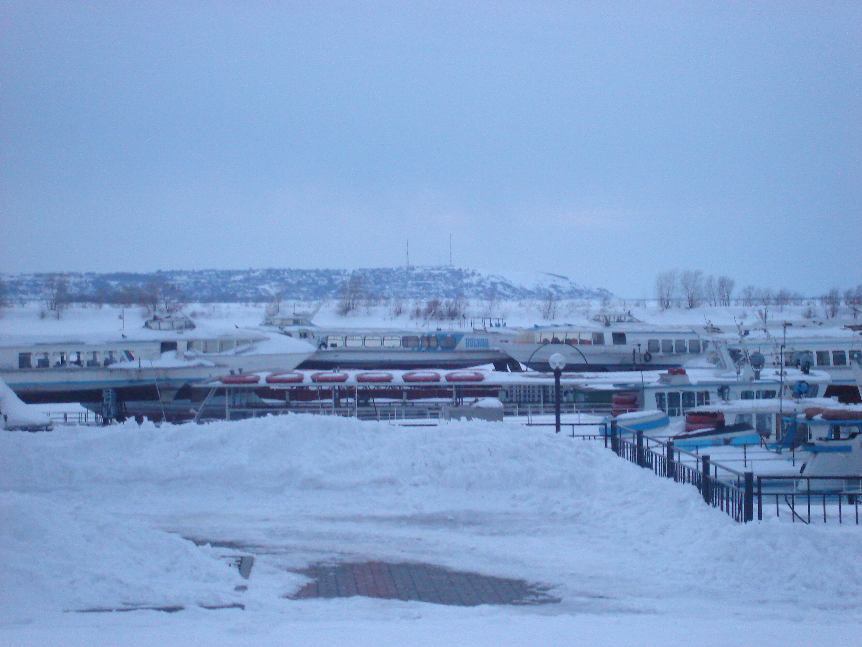 Oslantaw in Kazan/Qazanda. Услонская гора напротив Казани.